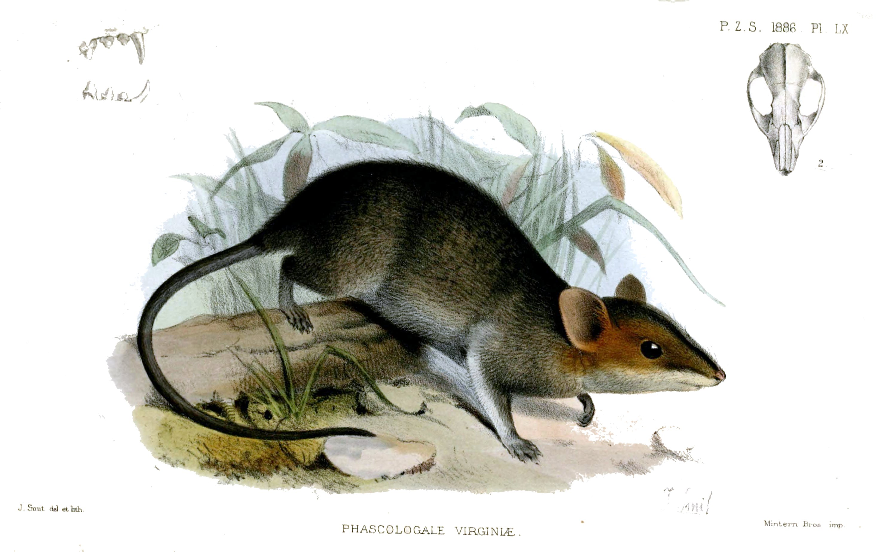 Phascologale virginiae